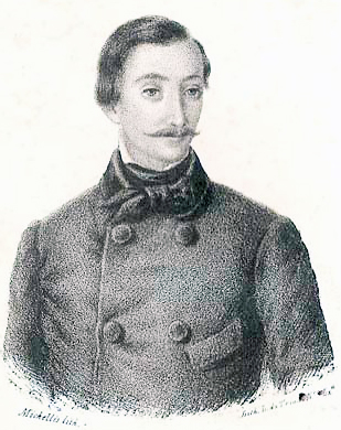 Luís Augusto Palmeirim (1821 - 1893), escritor e poeta português